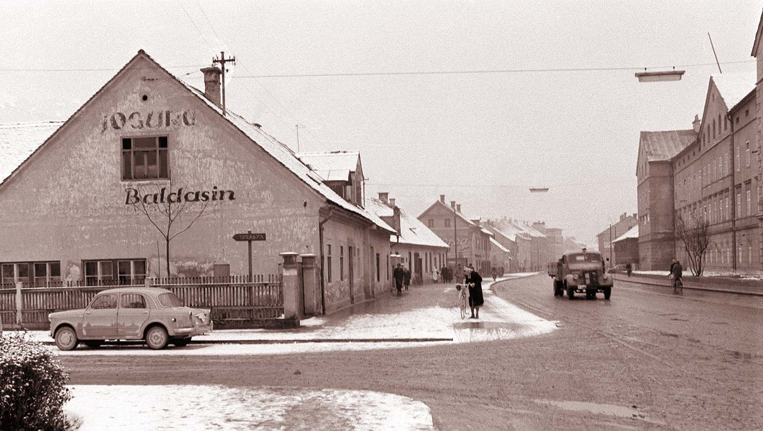 Gaberje.